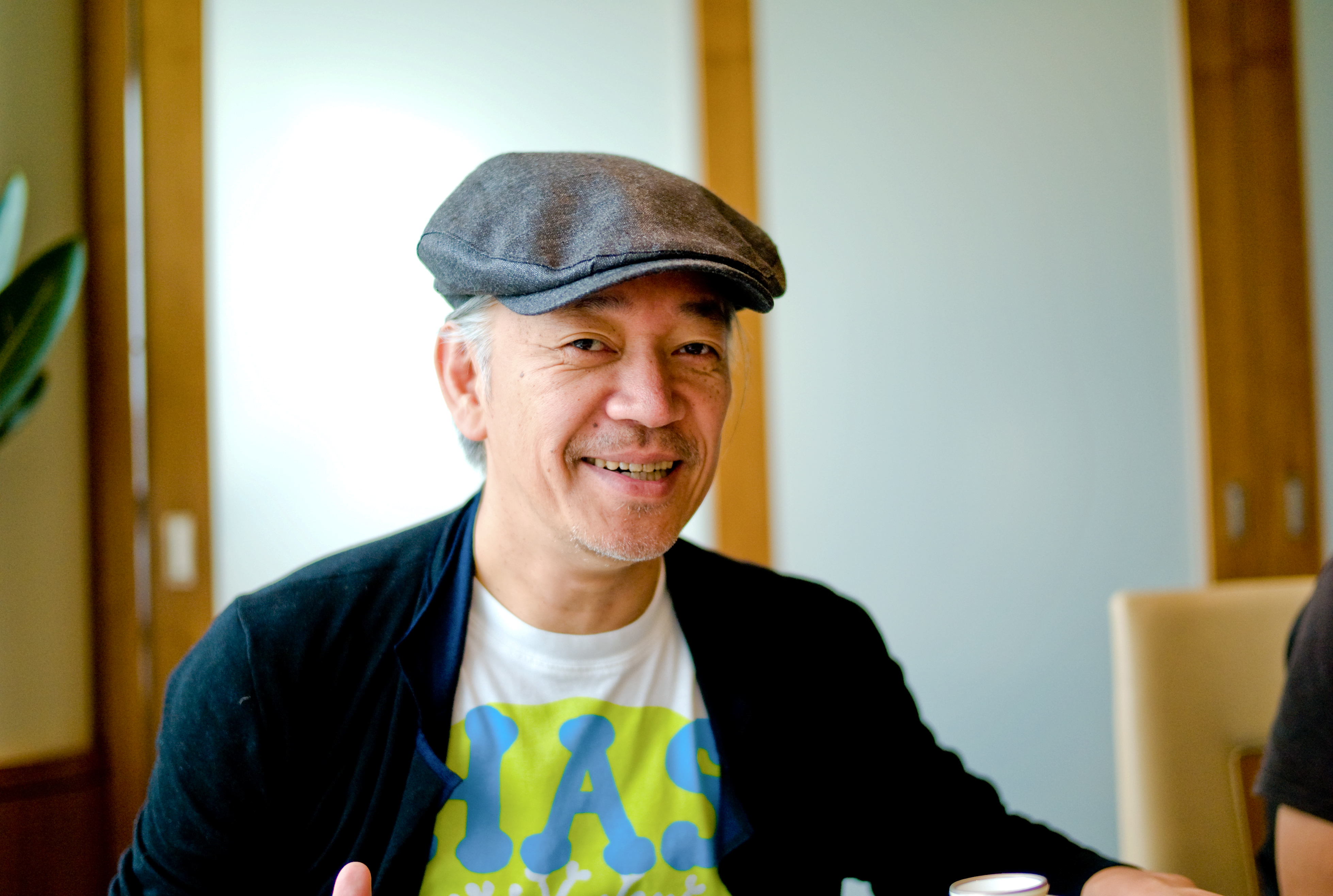 Ryuichi Sakamoto